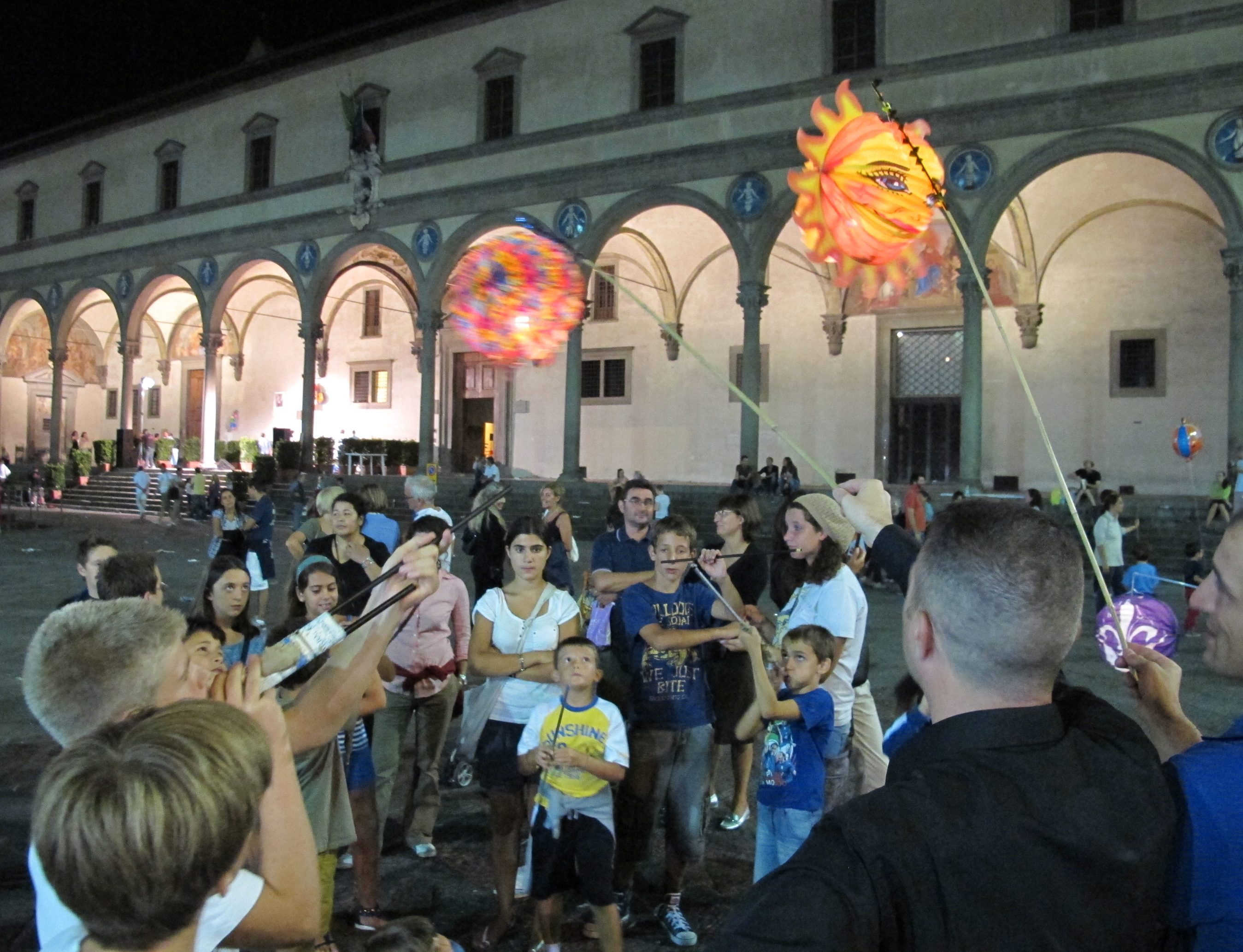 Festa della rificolona 2011